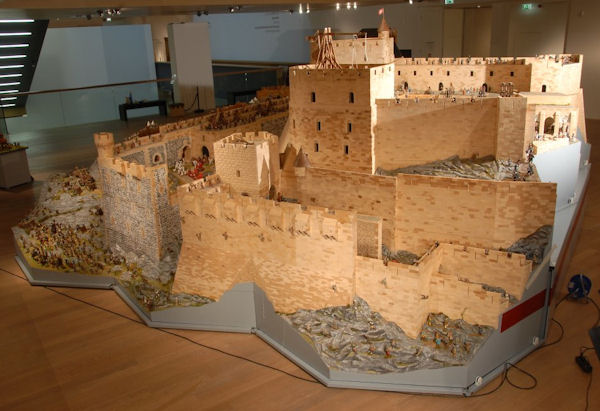 Modell Krak des Chevaliers in 1:25